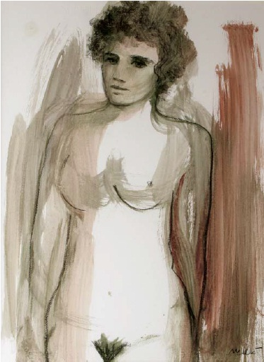 Retrato series Ellas